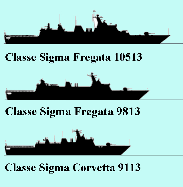 Classe Sigma variante